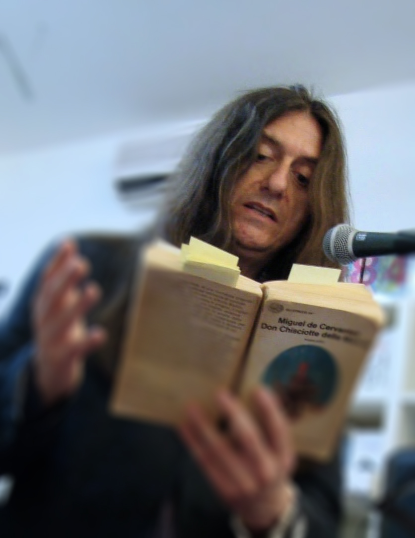 Leonardo Bonetti legge il Don Chisciotte